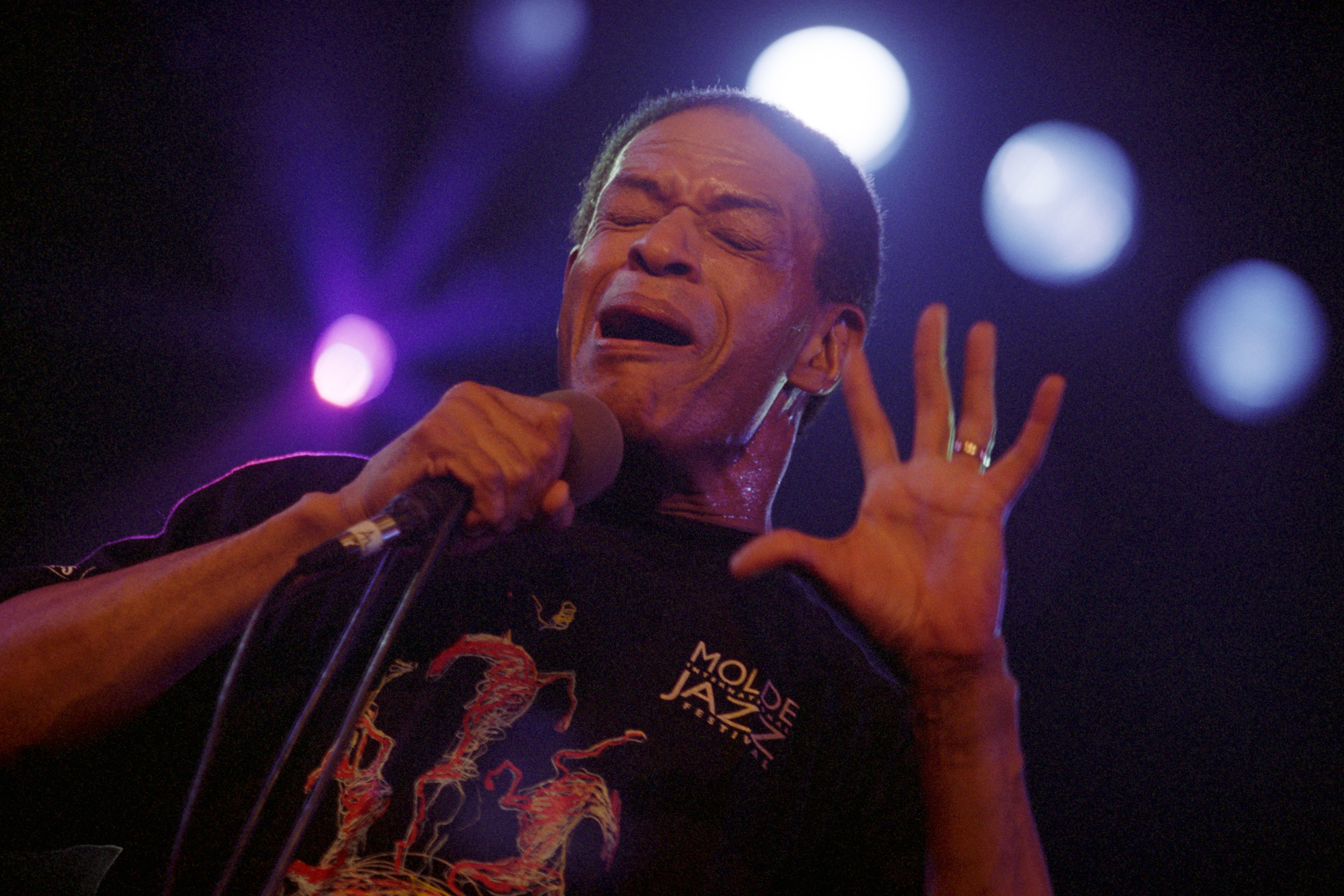 Al Jarreau under Molde International Jazz Festival 1996.